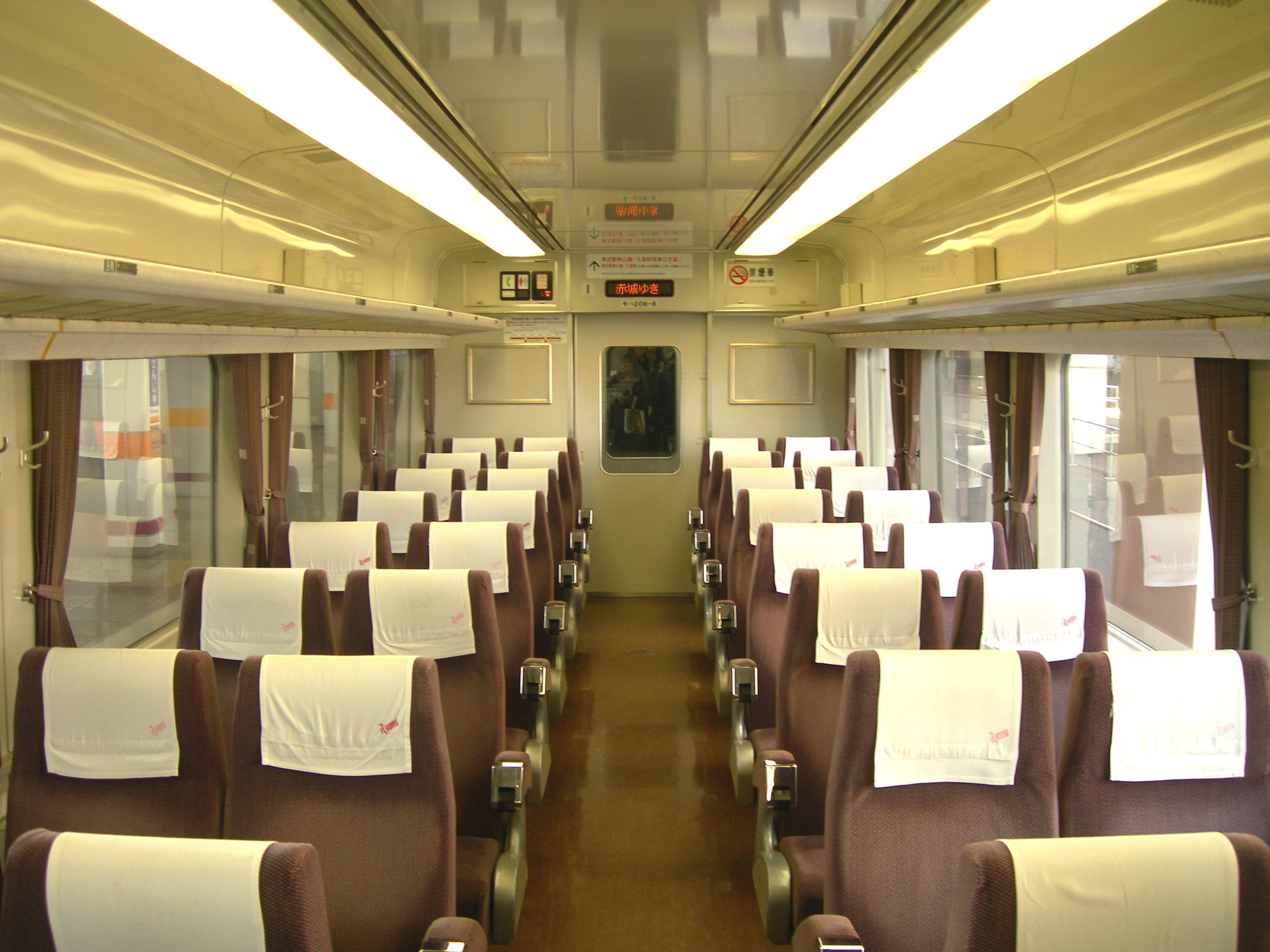 東武200系電車206F編成の車内